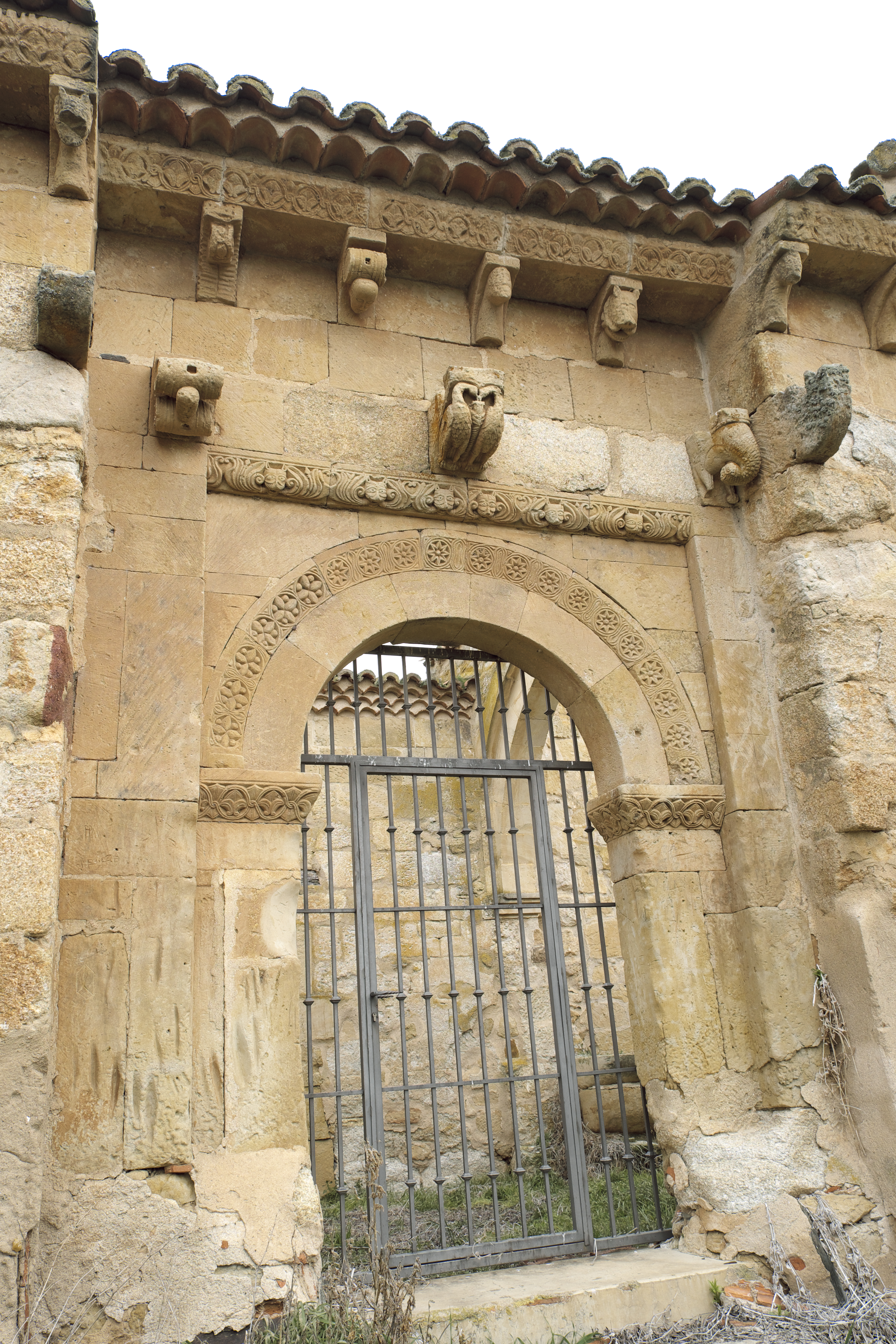 Kirche San Juan in Santibáñez del Rio bei Salamanca (Kastilien-León/Spanien), romanisches Portal